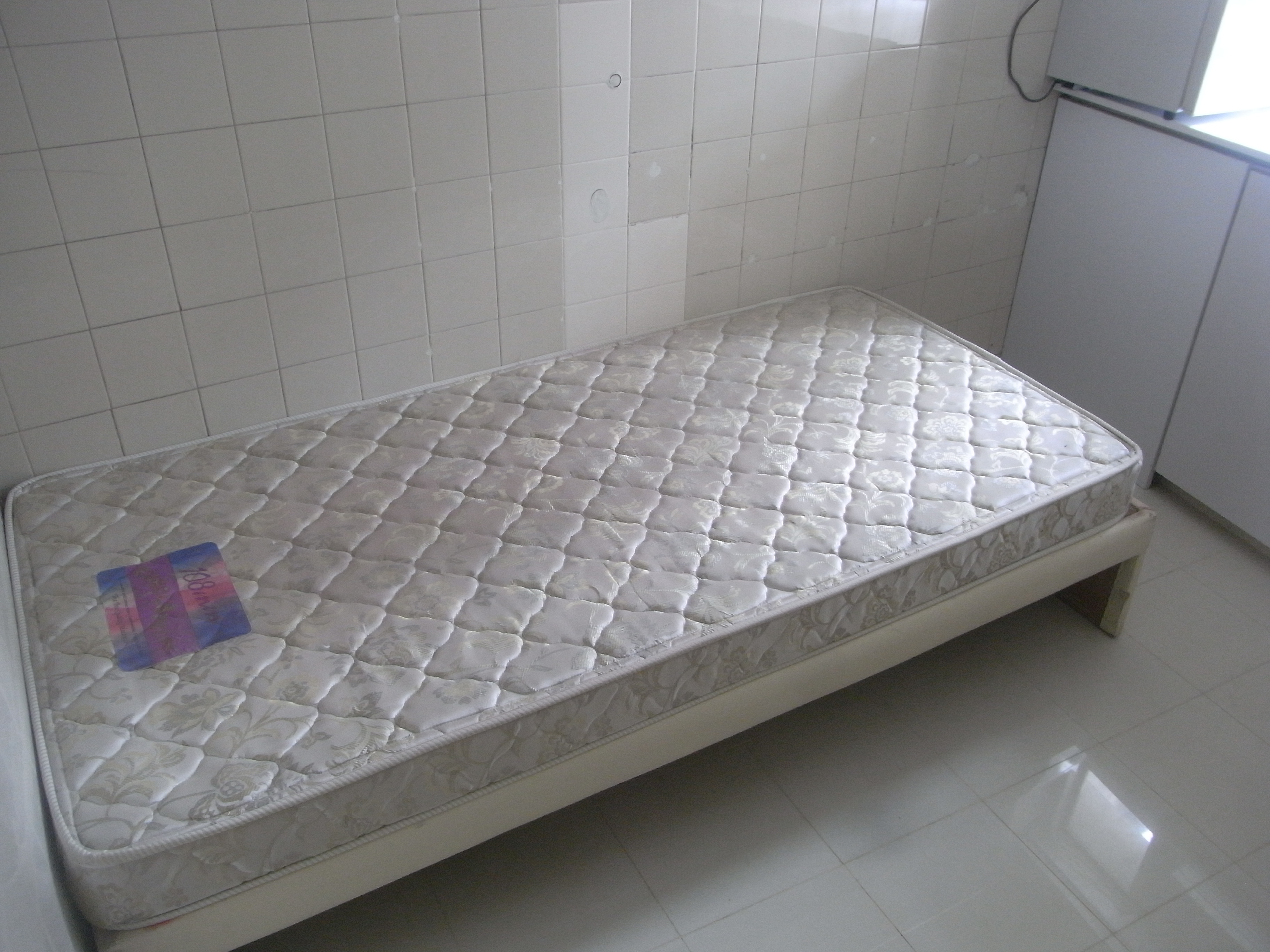 中文（香港）: 香港島唐樓劏房